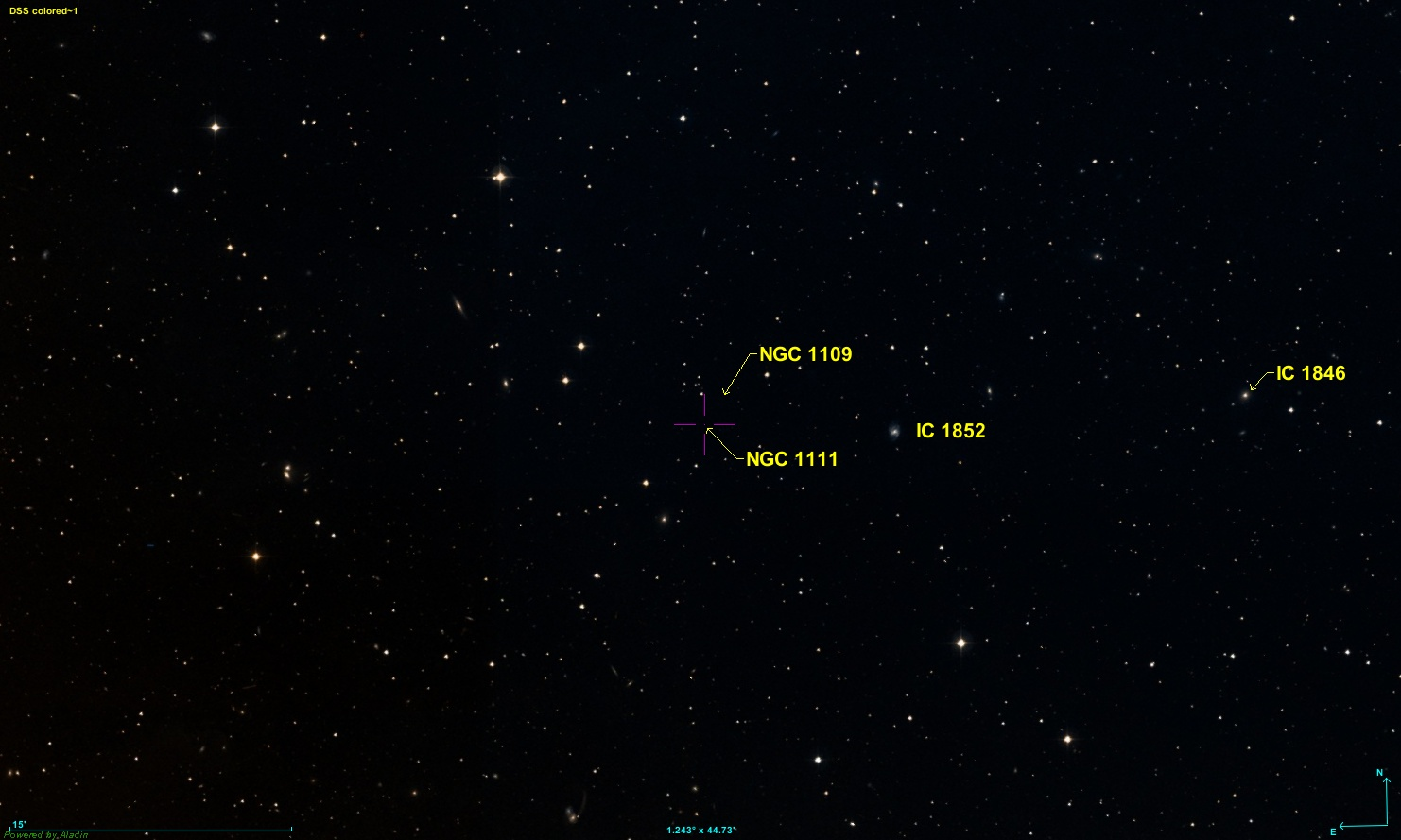 Image créée à l'aide du logiciel Aladin Sky Atlas du Centre de Données astronomiques de Strasbourg et des données de DSS (Digitized Sky Survey).